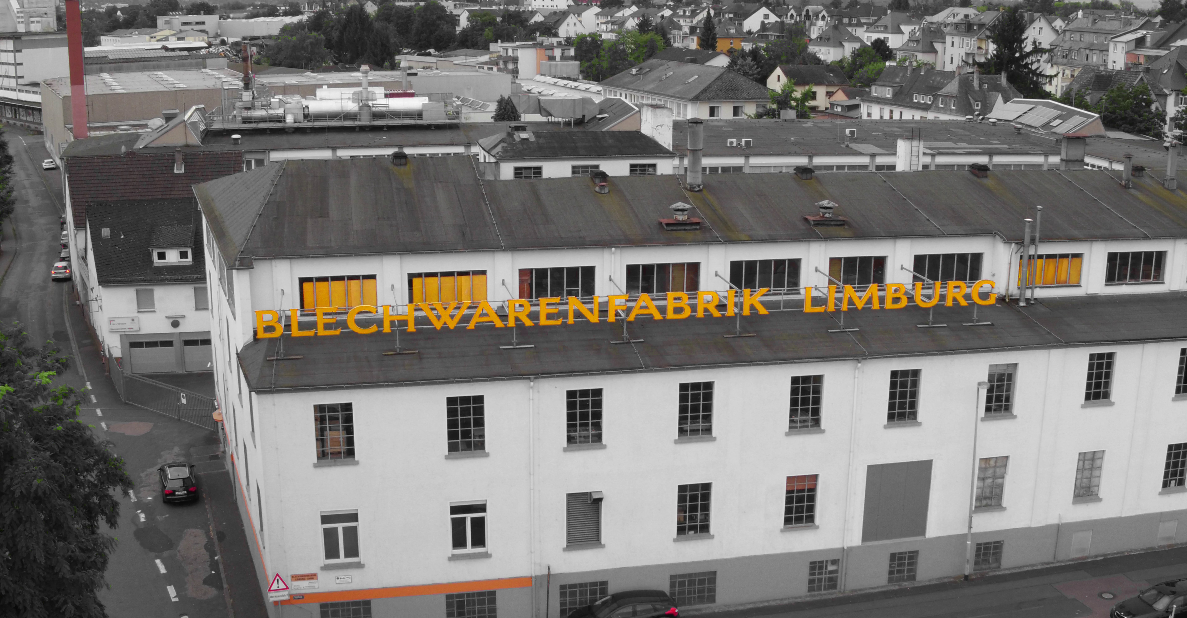 Seit über 128 Jahren der Stammsitz der Blechwarenfabrik Limburg